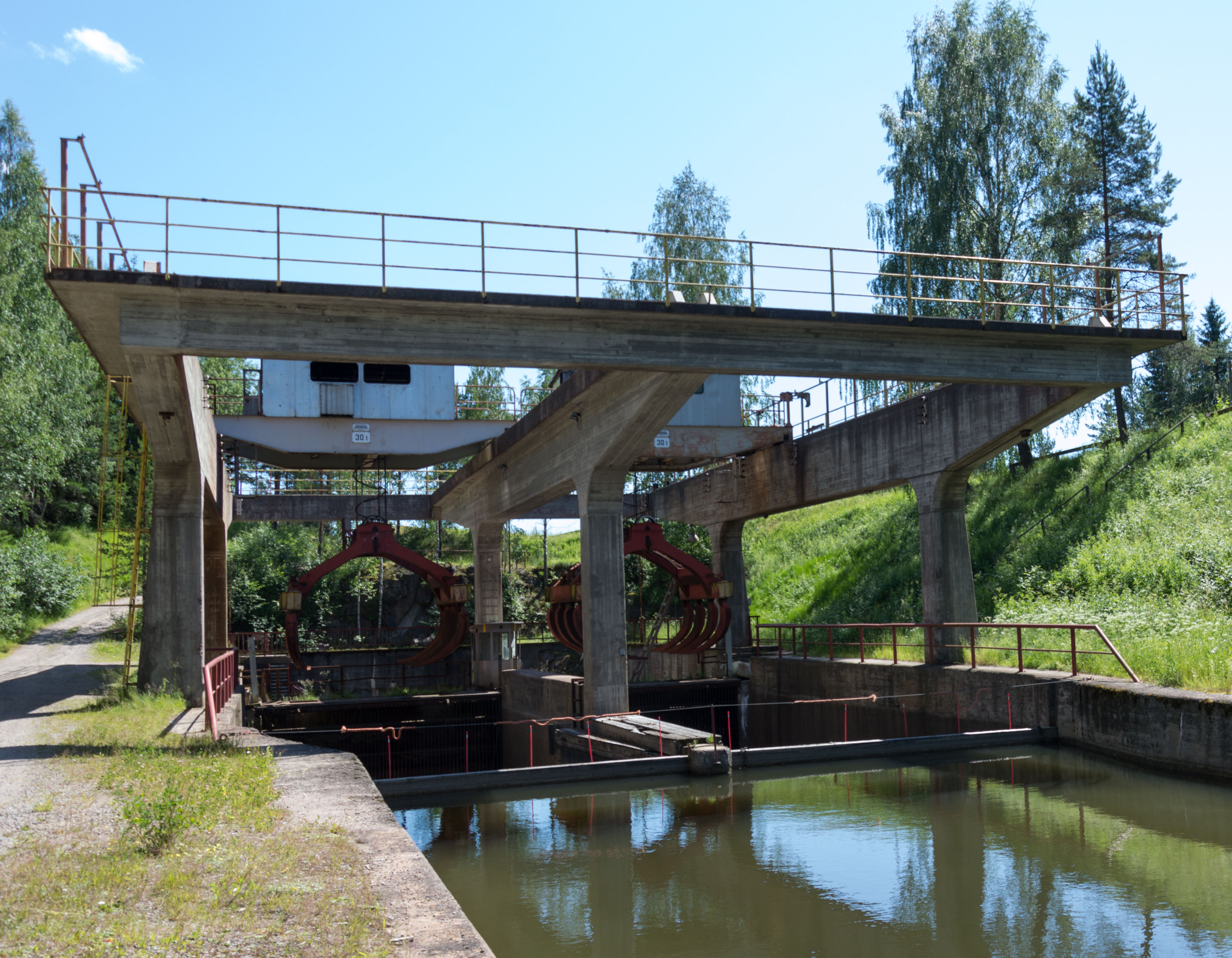 Kimola kanavan tukkinosturit